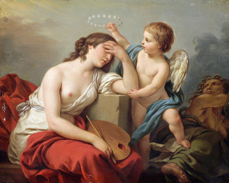 L'Amour des Arts console la Peinture des écrits ridicules et envenimés de ses ennemis